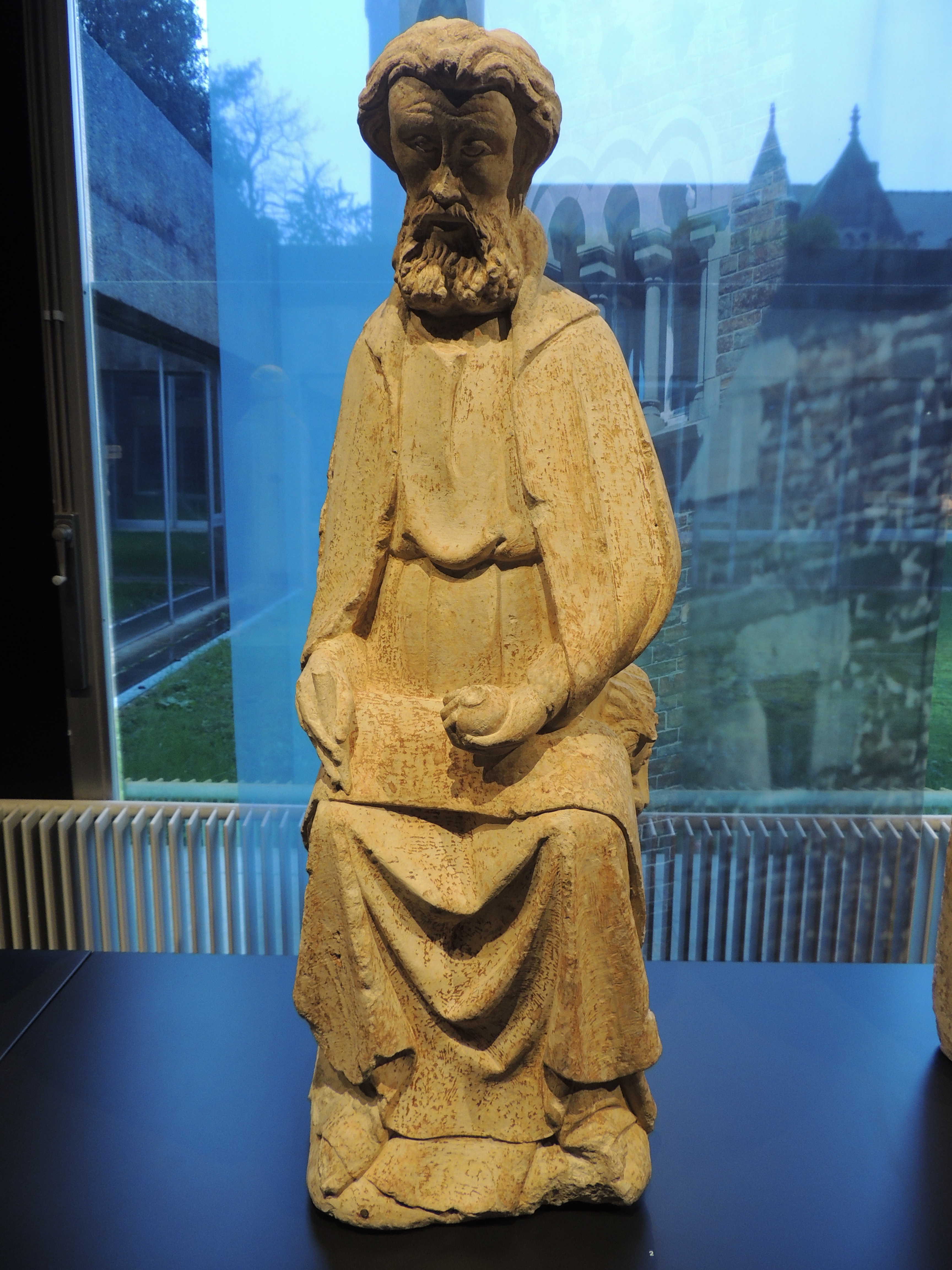 Statue de saint Marc provenant de l'ancien couvent des Carmes de Nantes, en France. Conservé par le musée départemental Thomas-Dobrée à Nantes.